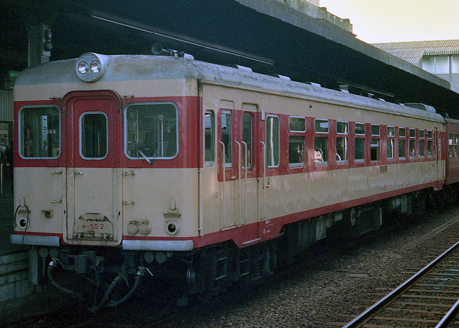 国鉄キハ55系気動車 キハ55 2